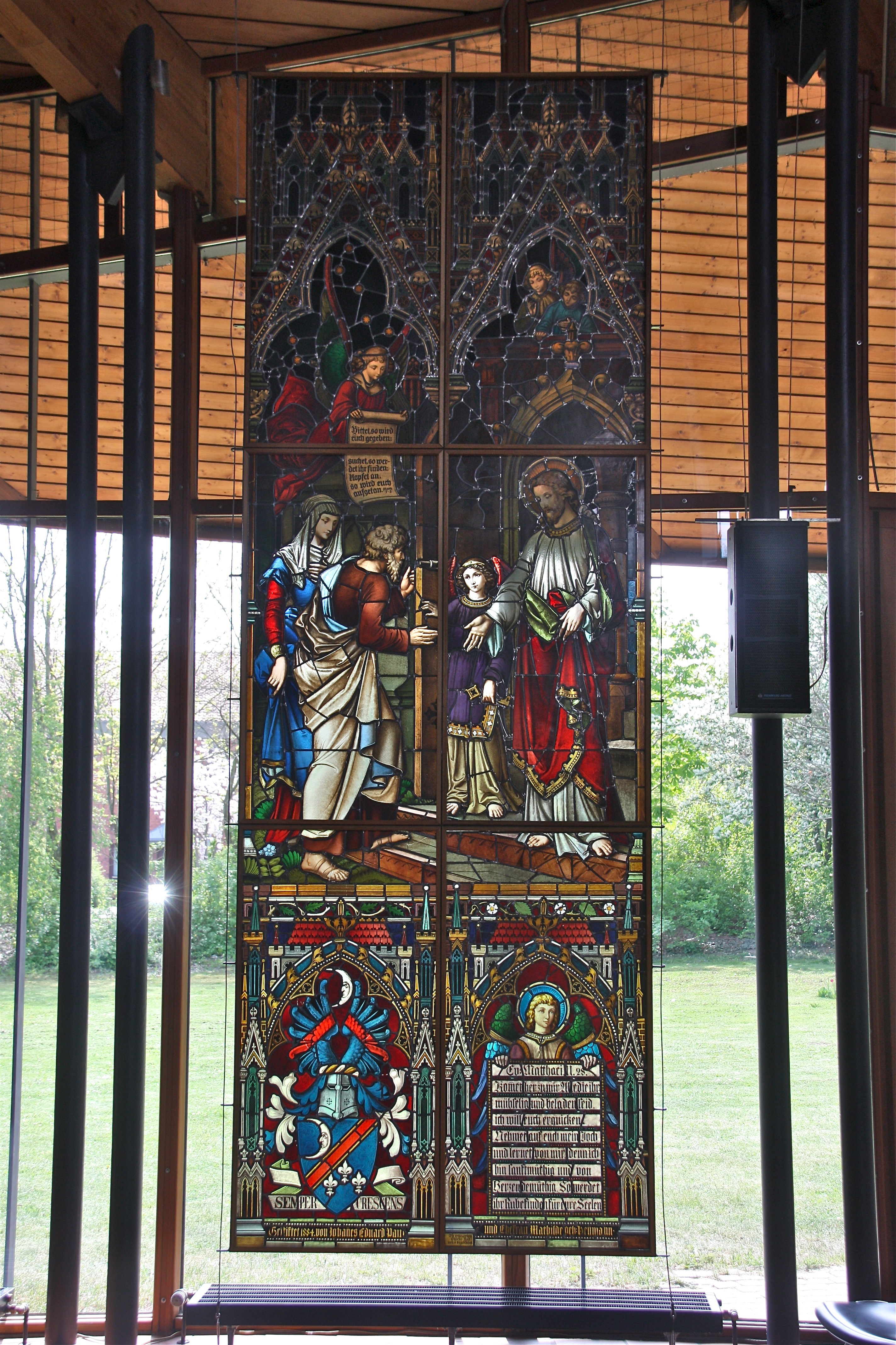 Hamburg, Neuallermöhe, Franz-von-Assisi-Kirche, Fenster der Barmherzigkeit